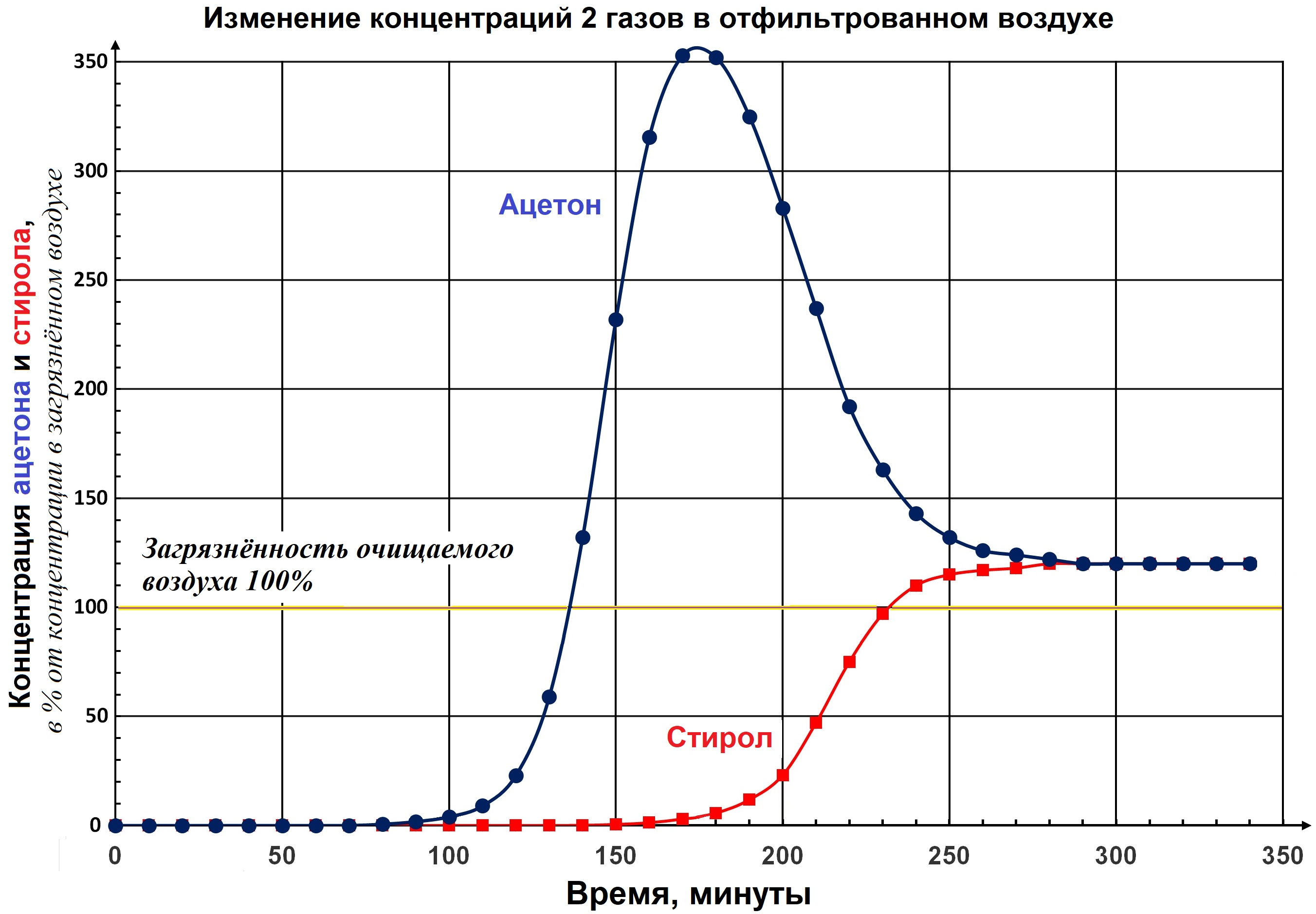 Изменение концентрации 2 газов в очищенном фильтром воздухе